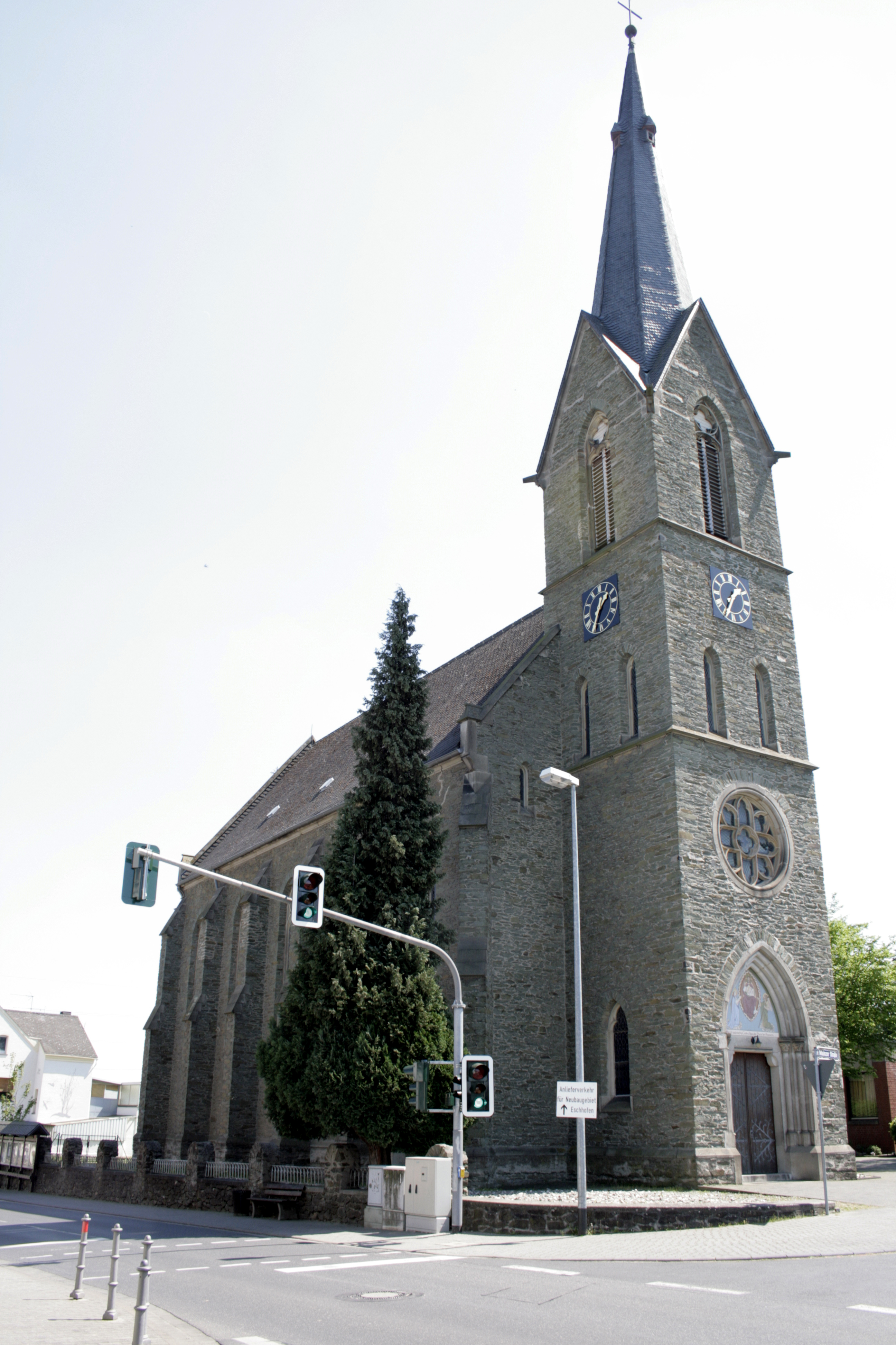 Kirche in Eschhofen, Deutschland